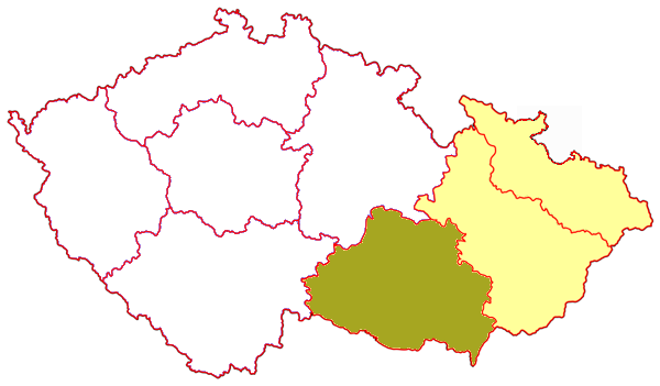 Mappa della diocesi cattolica di Brno, nella Repubblica Ceca. Lavoro personale.